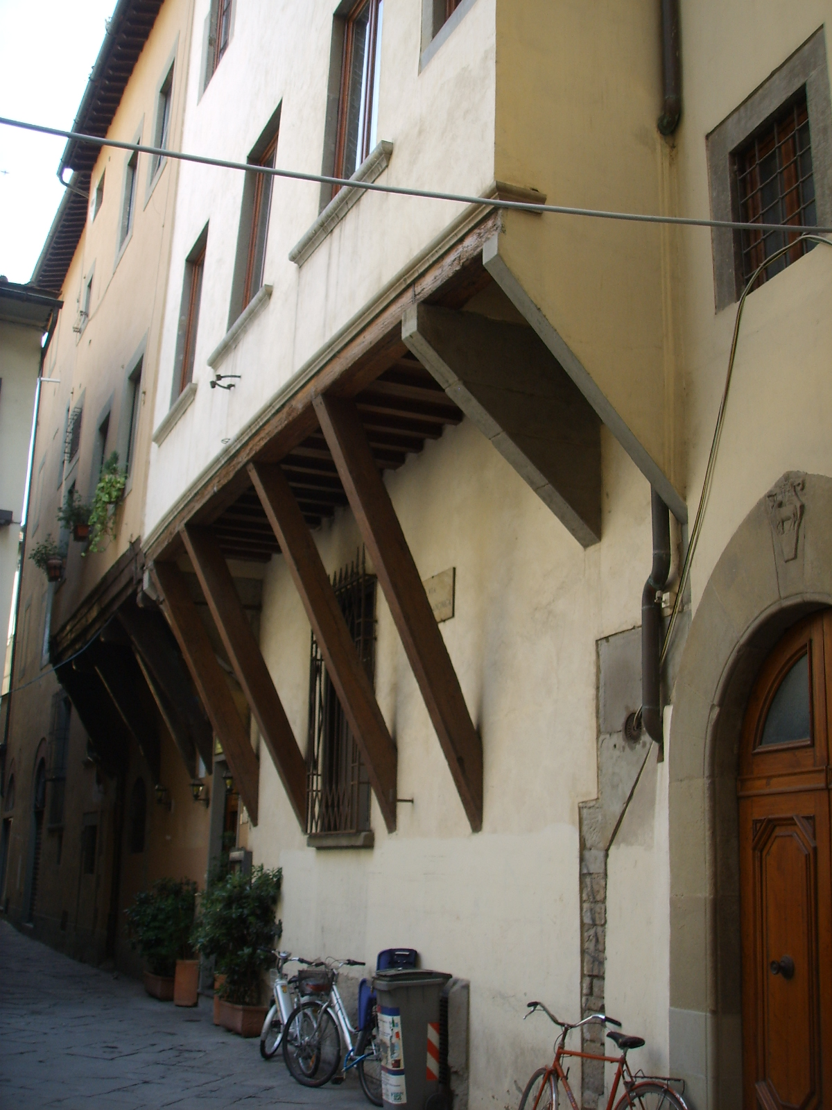 Sporti lignei